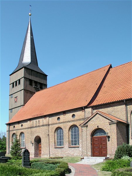 Kirche von Haselau 2007